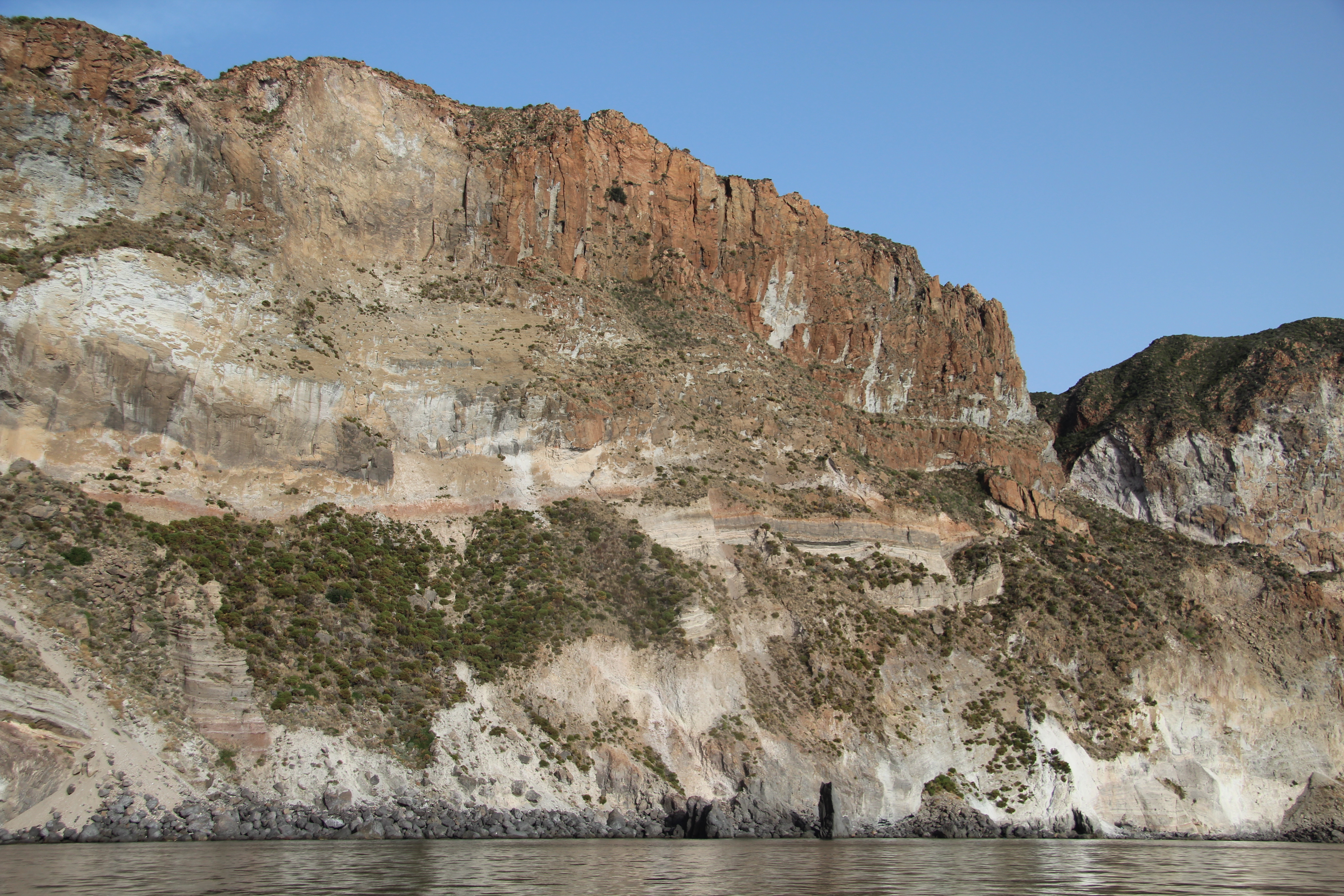 Lavastrom über älteren Tuff-Schichten (bzw. Ignimbrit?)